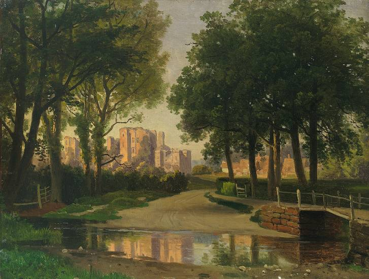 Georg Saal: Schloss in England, (bezeichnet „England“), Öl auf Leinwand, 36,5 x 48 cm